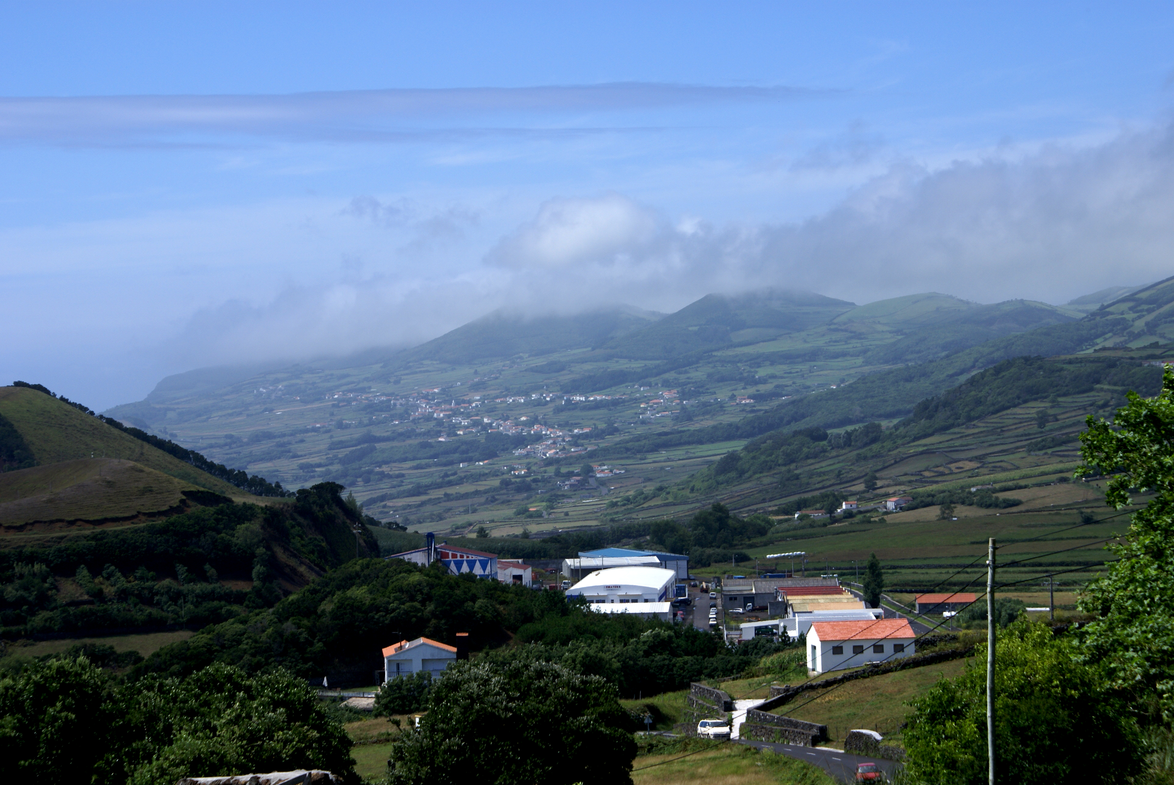 Rosais na distância, Velas, ilha de São Jorge, Açores